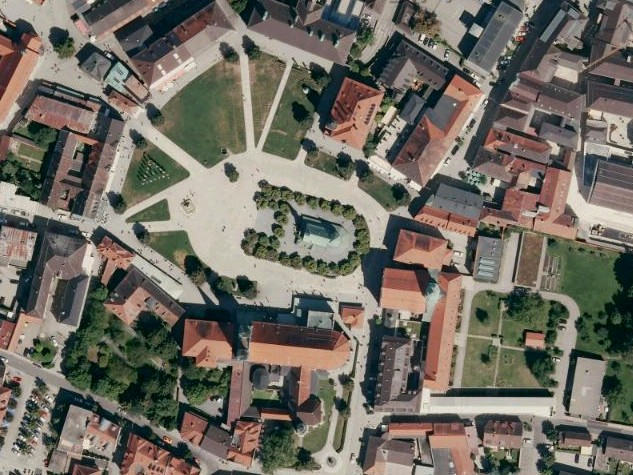 Luftaufnahme der Bayerischen Vermessungsverwaltung: Kapellplatz mit Gnadenkapelle in Altötting, Bayern.